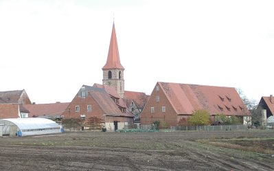 Poppenreuth, von SW, mit Kirche und typischem Ackerland im Vordergrund